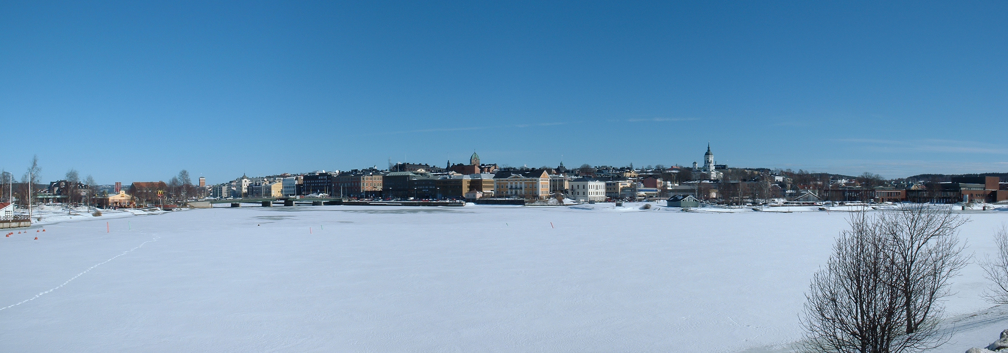 Panorama of Härnösand, Sweden